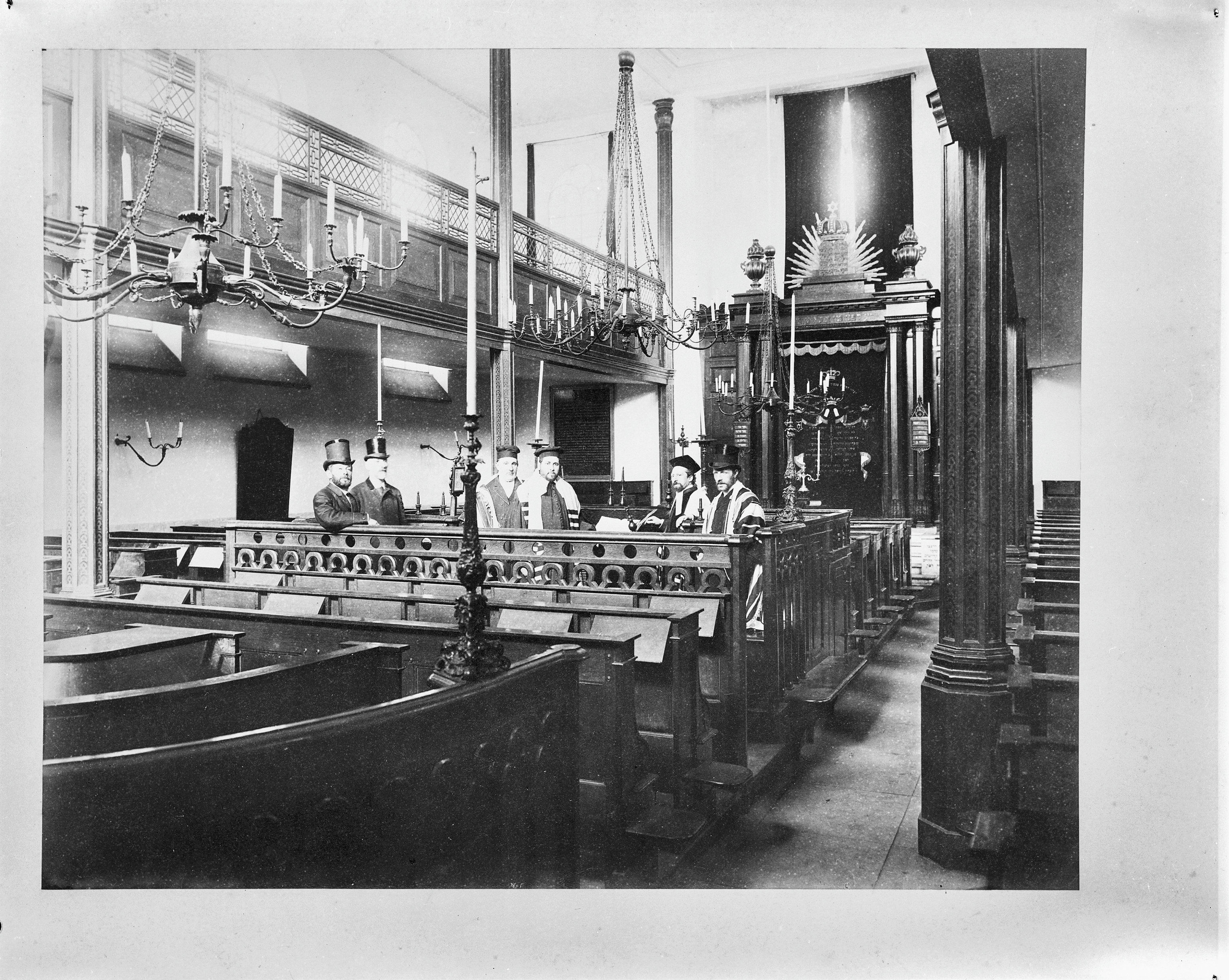 Synagoge: reproductie van oude interieur